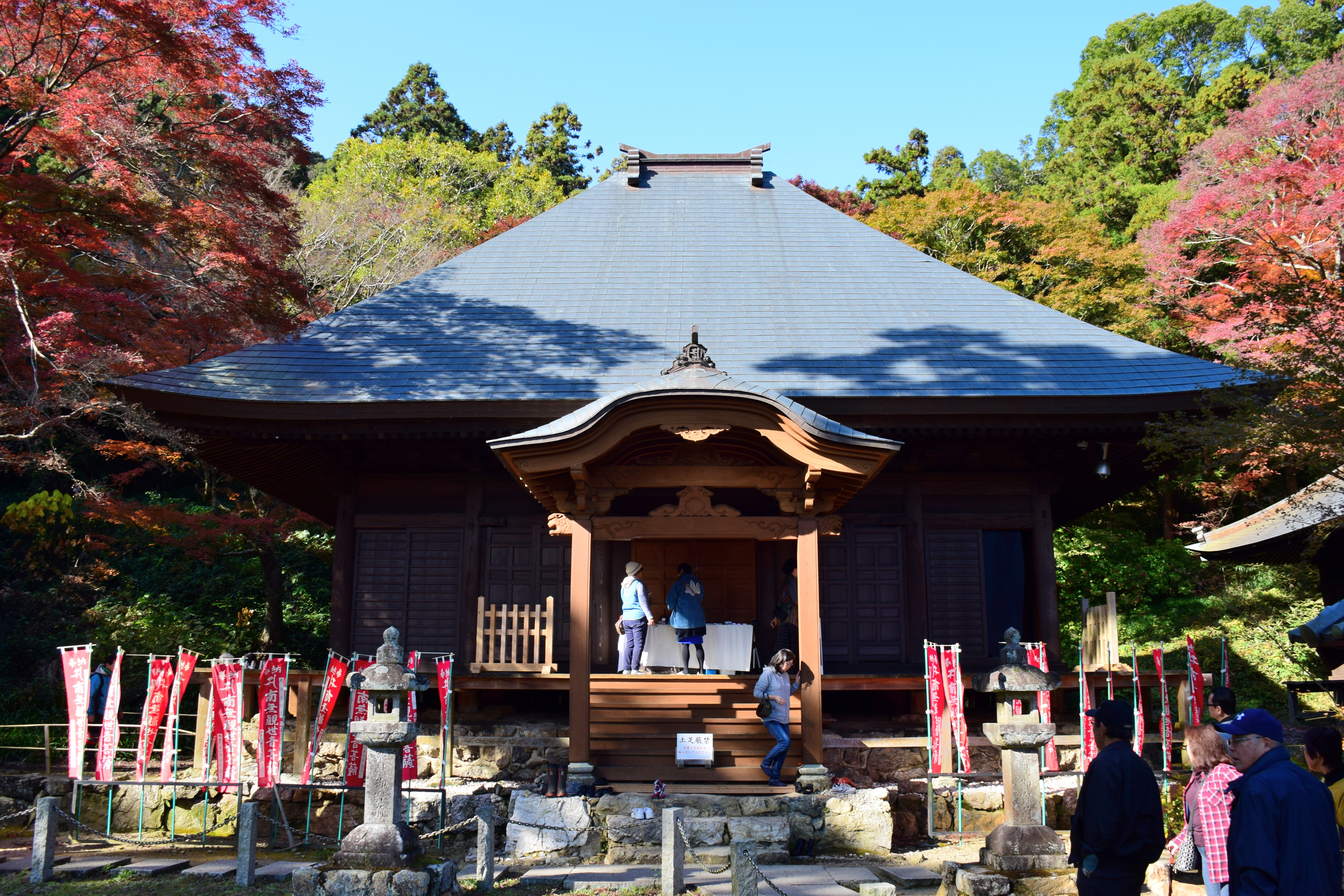 普門寺の本堂